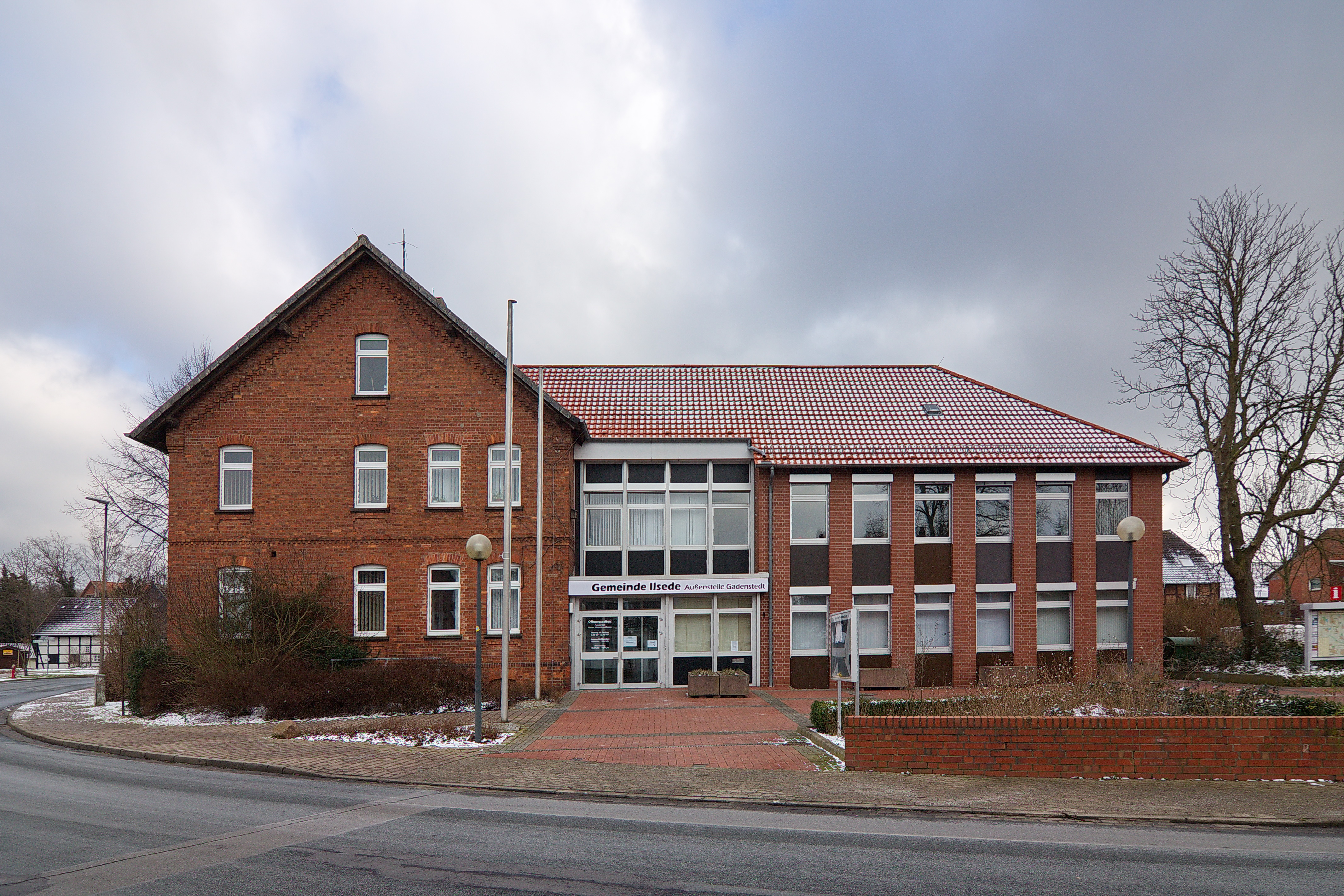 Ortsbild in Gadenstedt (Ilsede), Niedersachsen, Deutschland. Ehemaliges Rathaus von Lahstedt.